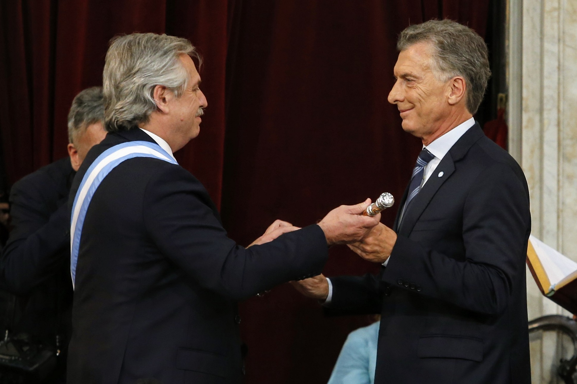 Alberto Fernández, presidente electo de Argentina, recibiendo el bastón de mando de manos de Mauricio Macri, presidente saliente.